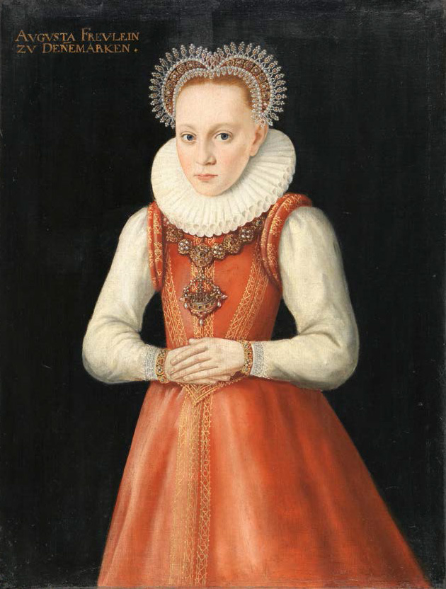 Porträt Augustas von Dänemrk in jungen Jahren